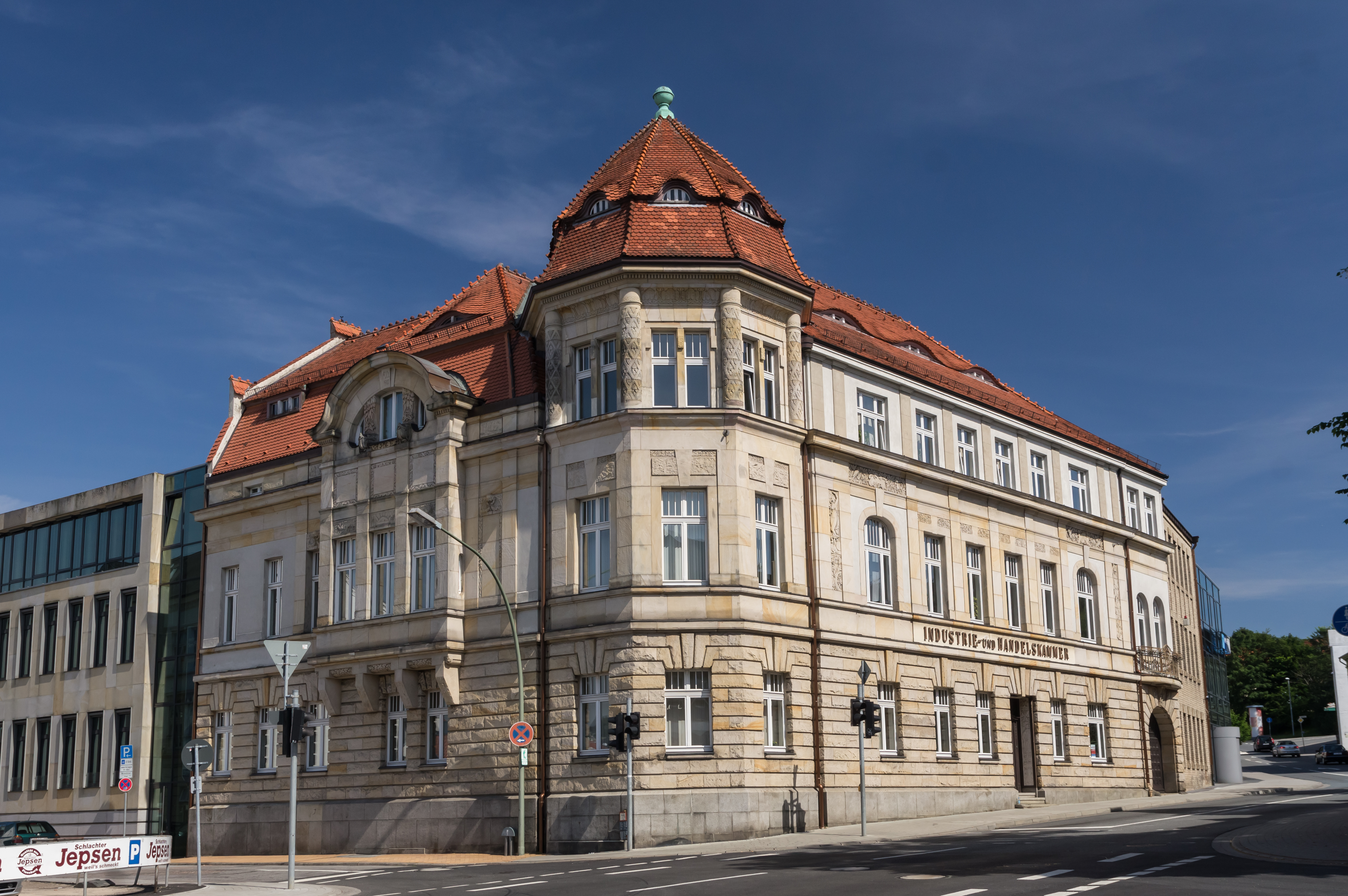 Flensburg-Sandberg; Heinrichstraße 34; Industrie- und Handelskammer; Denkmal-Nr. 2